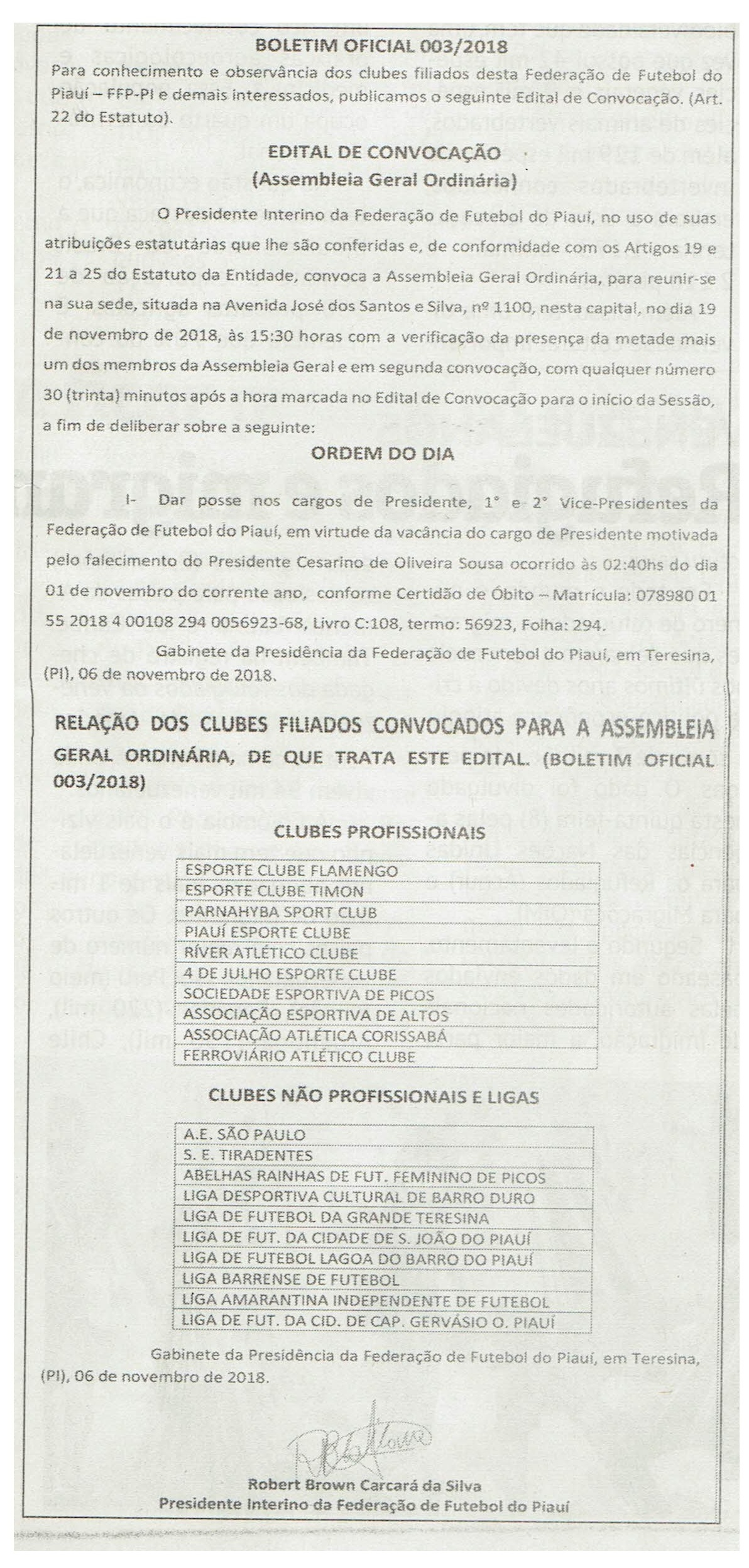 Edital da Federação de Futebol do Piauí em novembro de 2018 publicado no Jornal Meio Norte, na página 7 da edição de 9 de novembro de 2018.